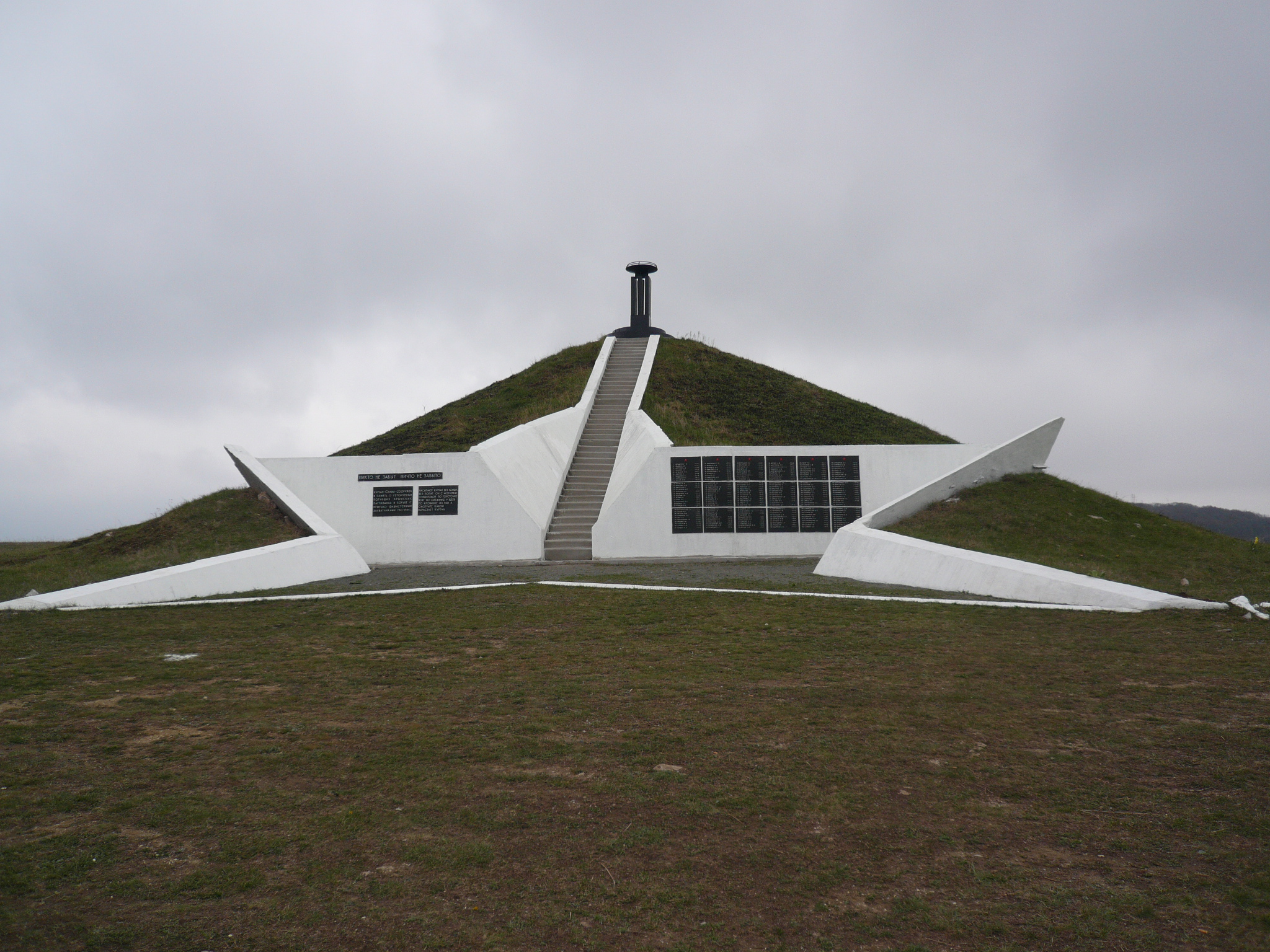 Мемориал, установленный в честь партизан, героически сражавшихся с немецко-фашистскими захватчиками во время Великой Отечественной войны.